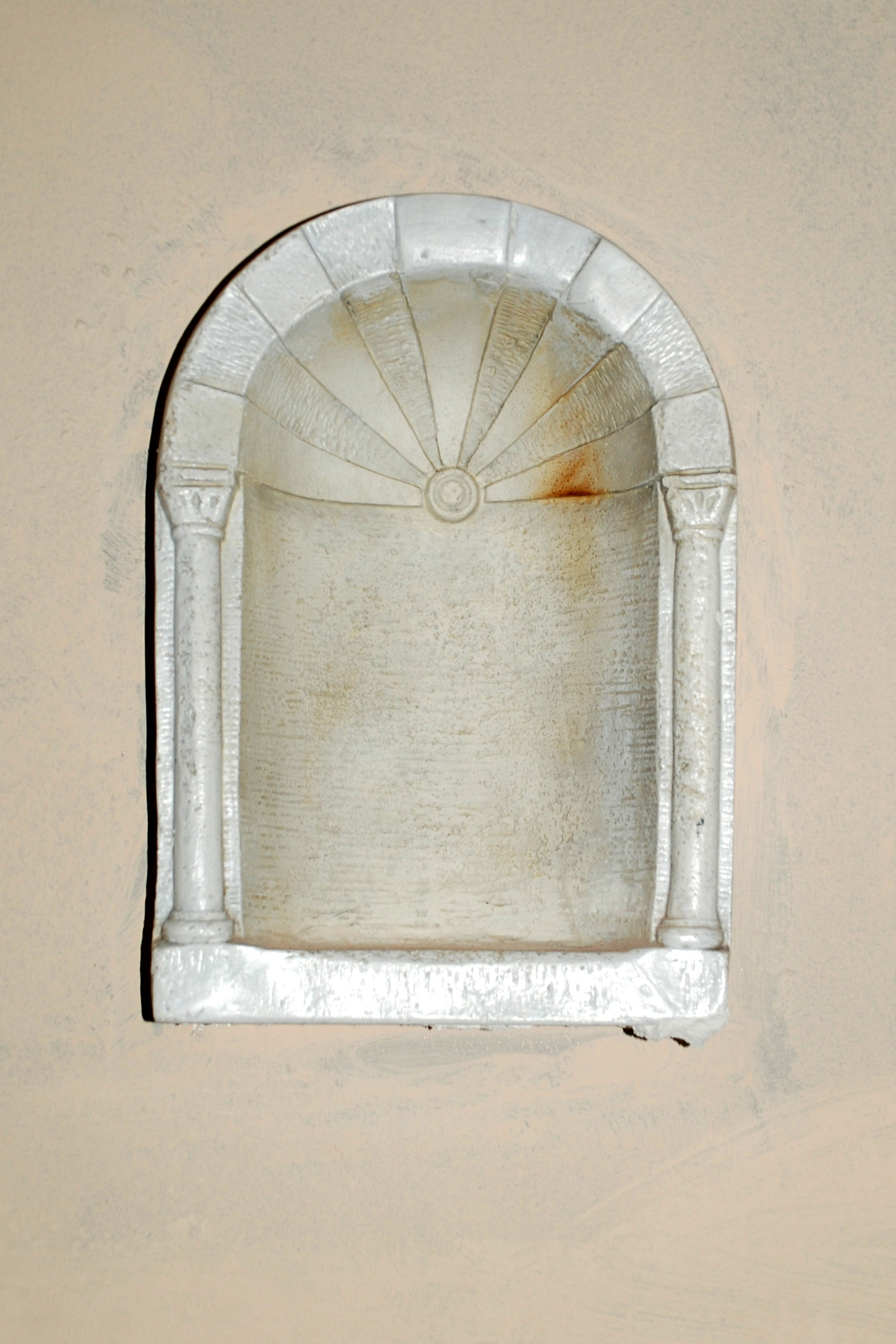 Belgique - Brabant wallon - Ottignies - Église Saint-Rémi